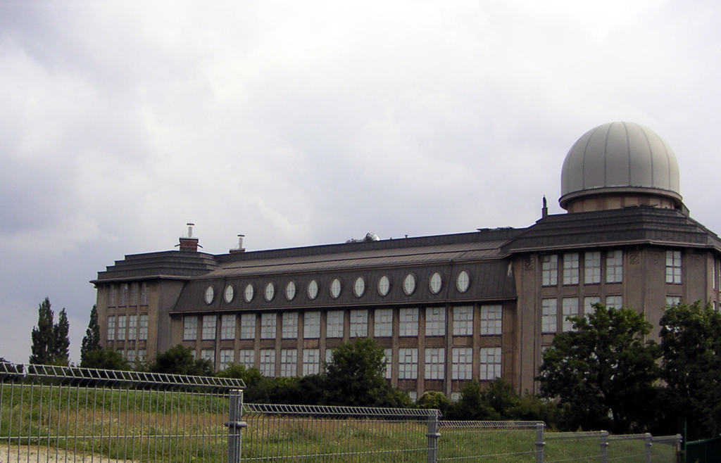 Militärbau aus der Zeit der österreichisch ungarischen Monarchie in Wien, selbst fotografiert